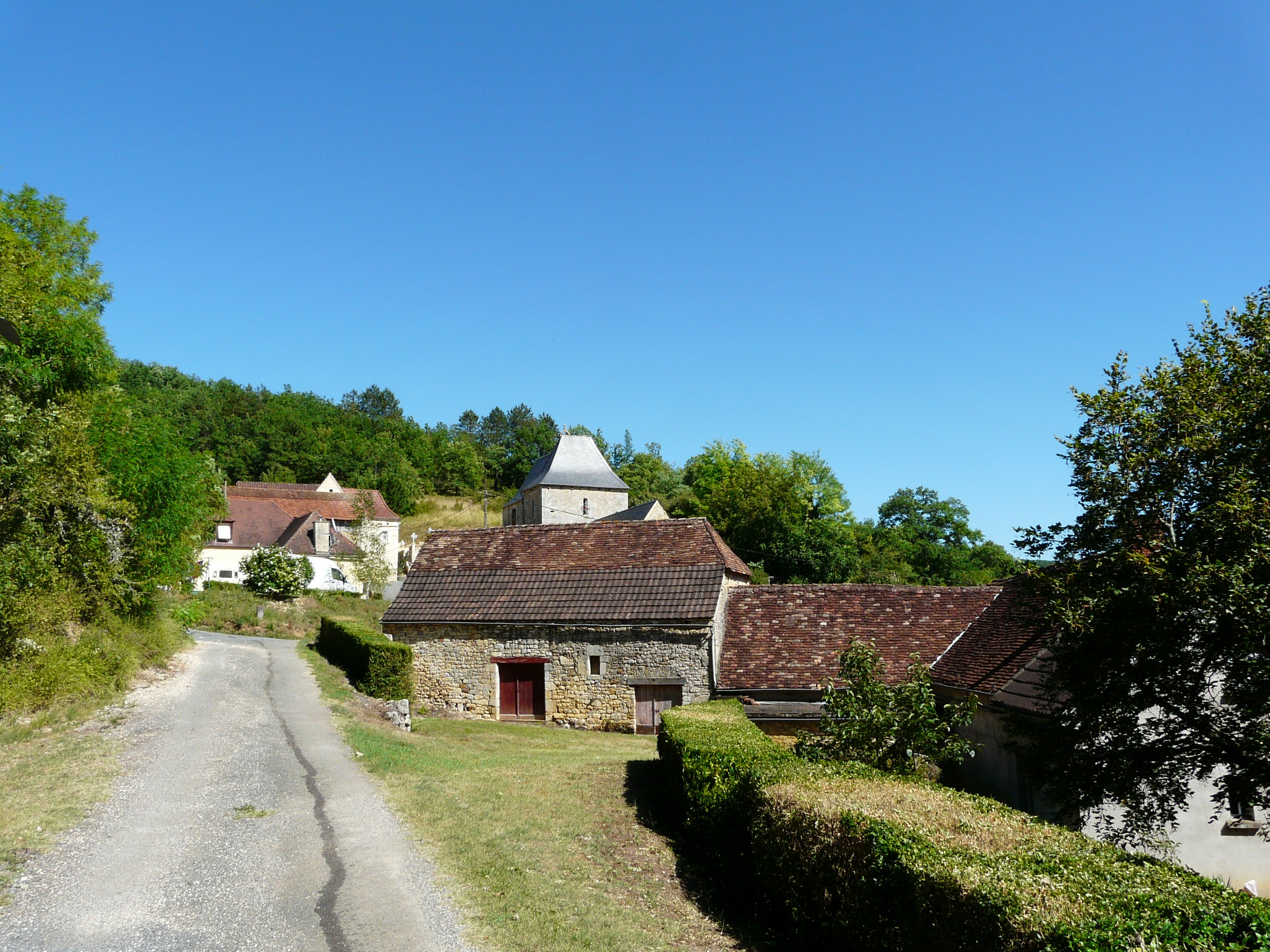 Le village d'Orliaguet, Dordogne, France.